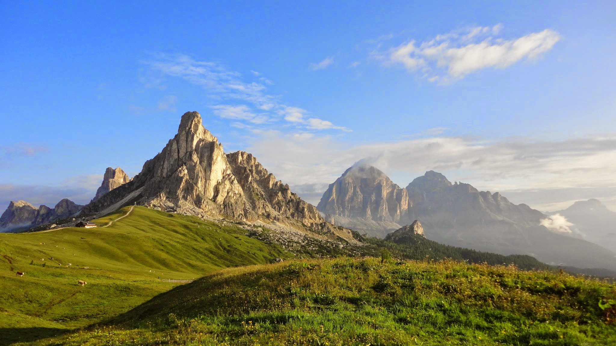 La Gusela del Nuvolau vista dal passo Giau